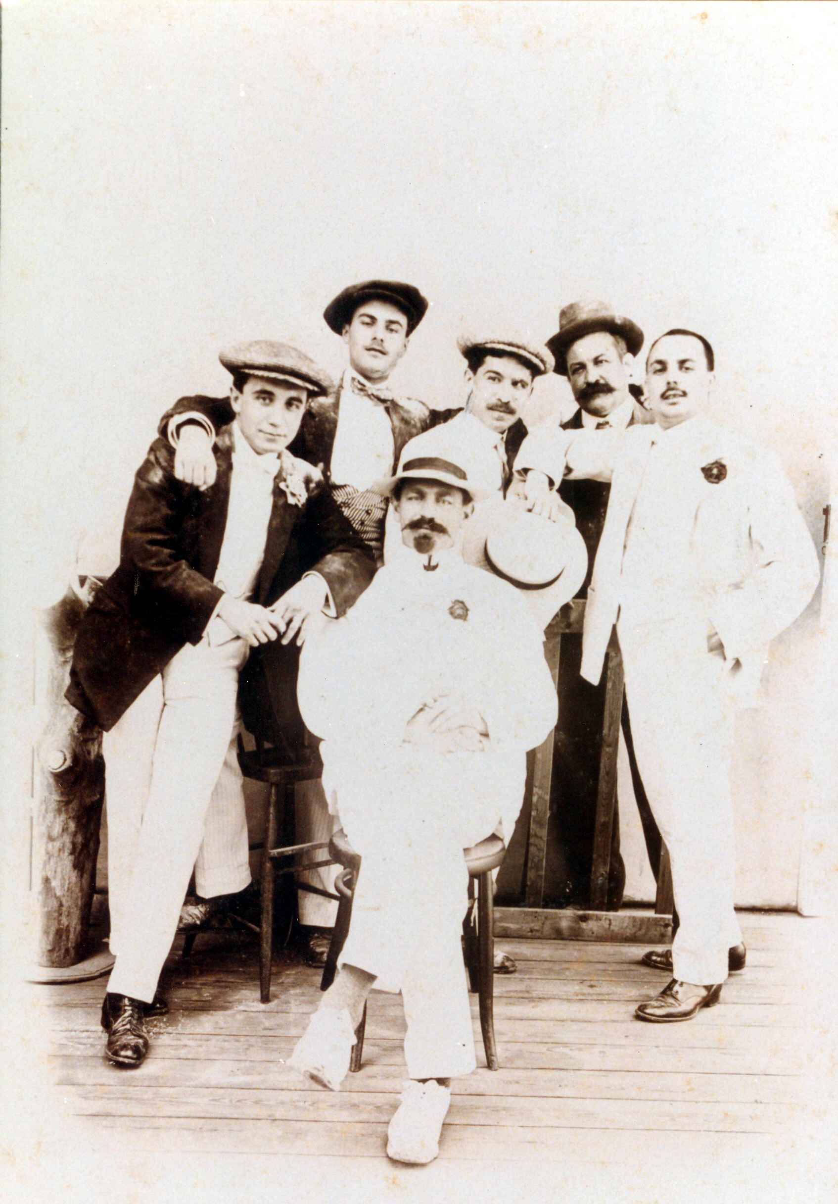 Kapitän Jürs (vorn, Mitte) mit Leuten aus der Bevölkerung, vermutlich (v.l.n.r.) Juan Lozano Pérez, Blas Pérez González [1], José Lozano Pérez [2], Eladio Duque Batista [3] y Lope Fernández Casaseca